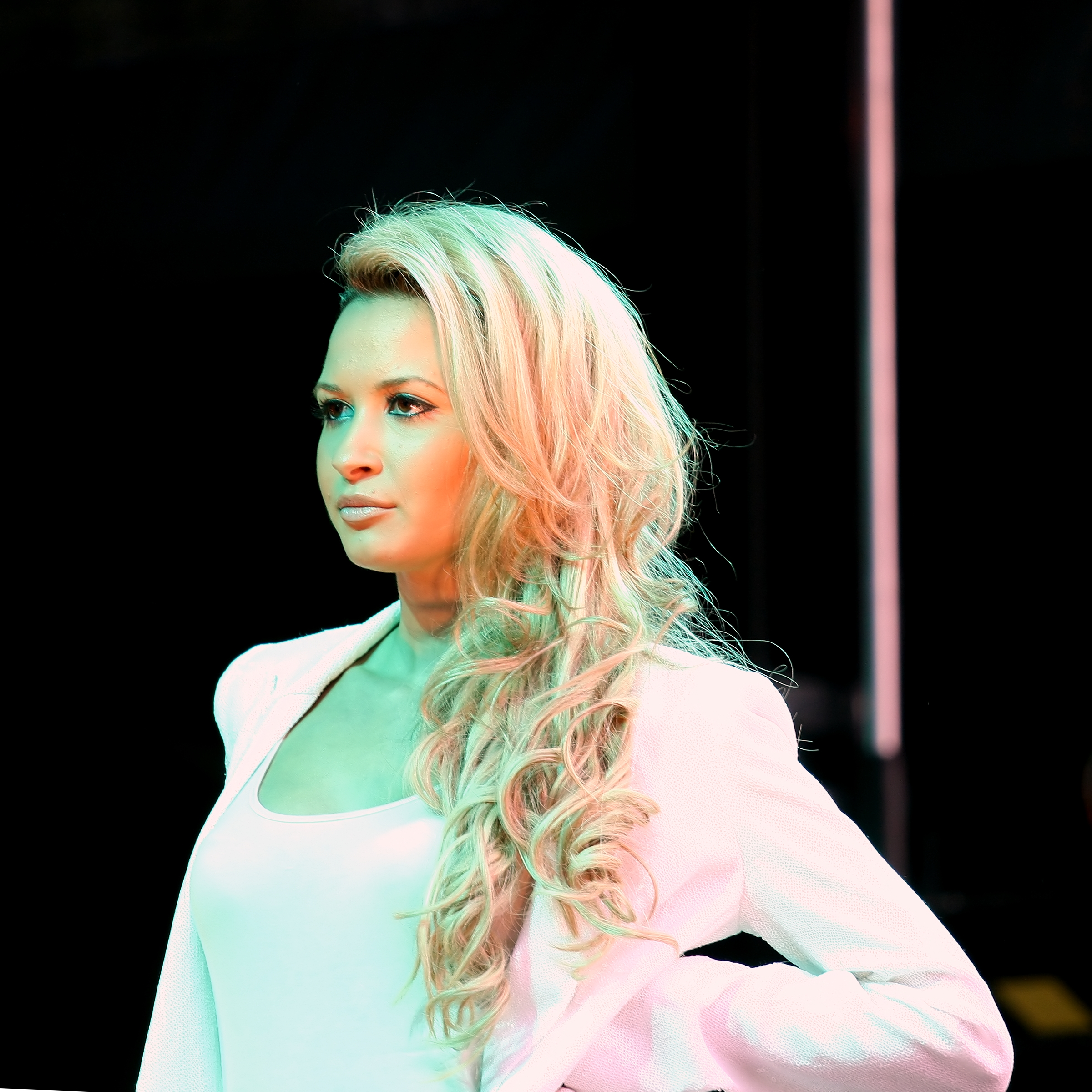 Die Gruppe „Monrose“ - Mandy Capristo - auf der Hauptbühne auf dem Heumarkt, Köln. Bühnenprogramm zum CSD-Straßenfest/ColognePride 2009.